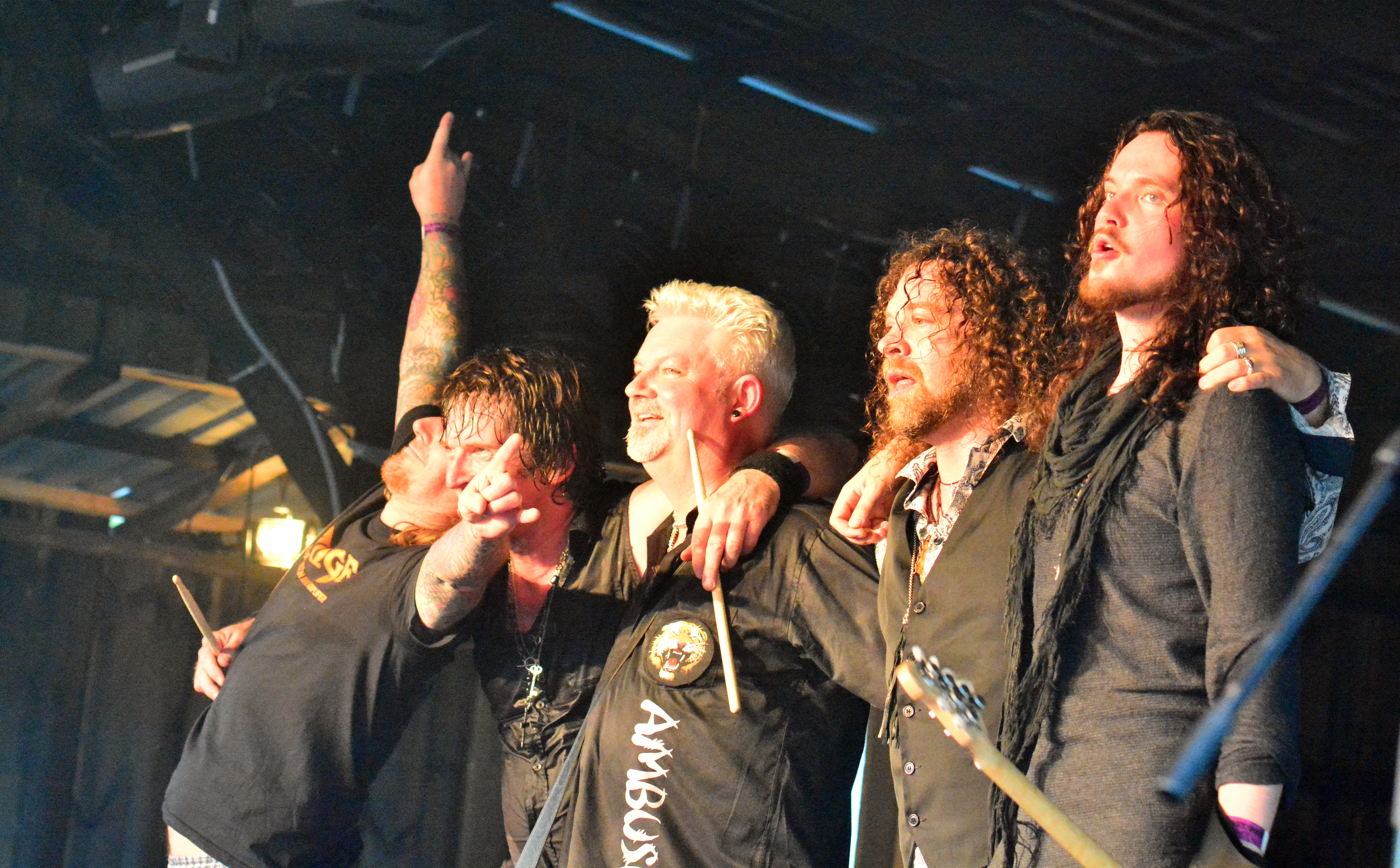 Tygers of Pan Tang beim Headbangers Open Air 2014